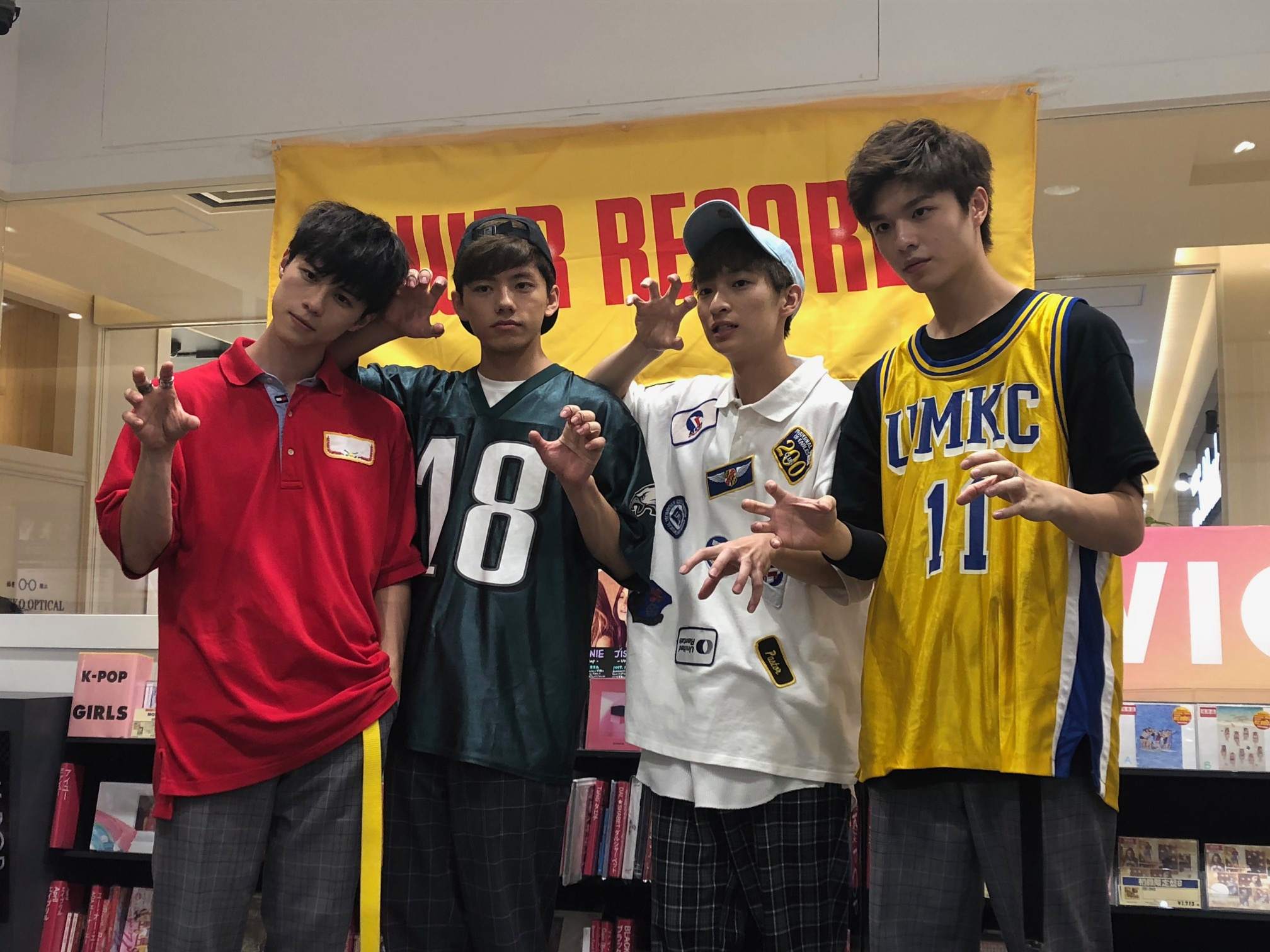 タワーレコード グランツリー武蔵小杉店にて撮影